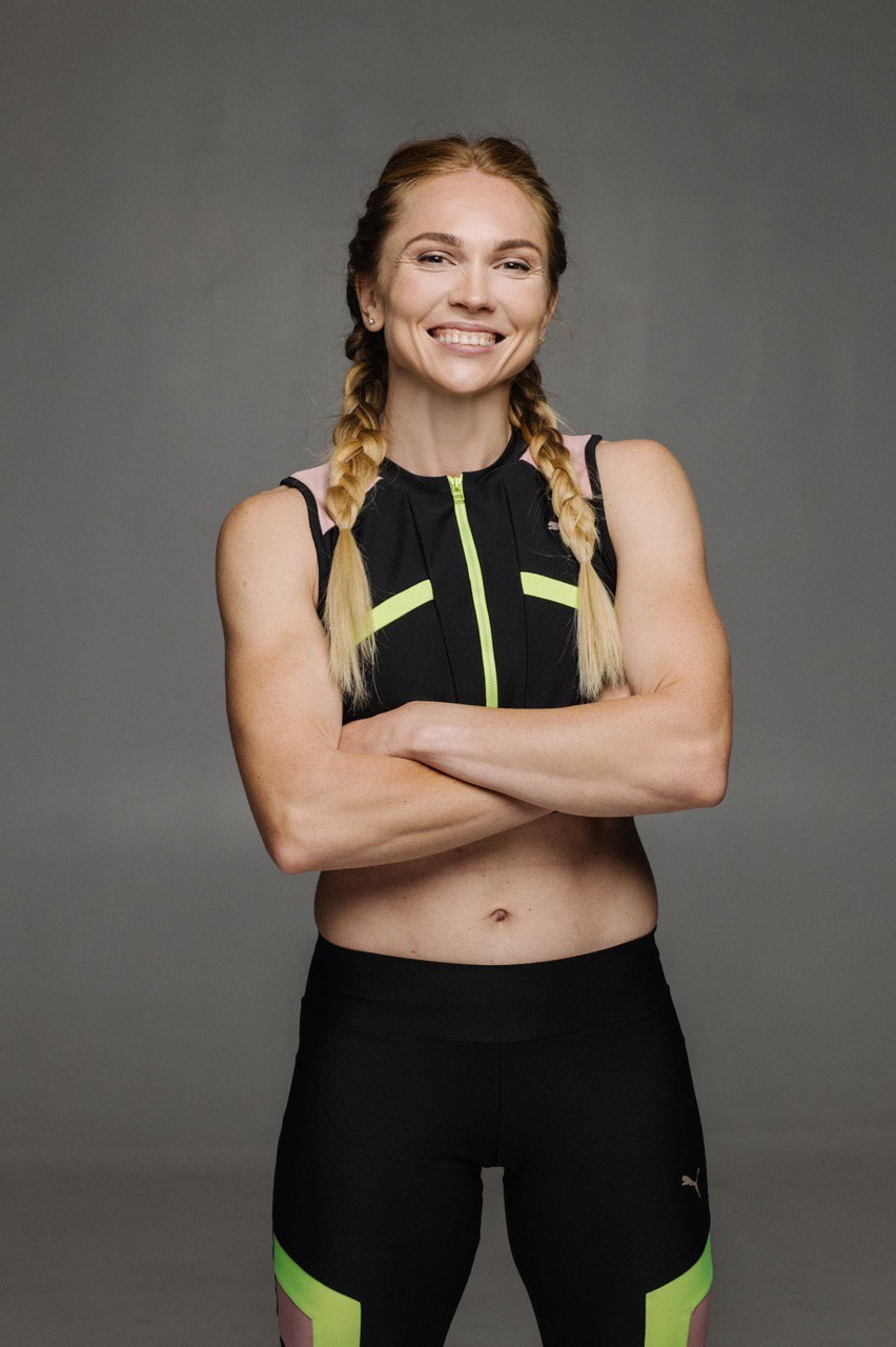 Христина Стуй, українська спринтер